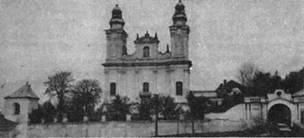 Костел Мурафа